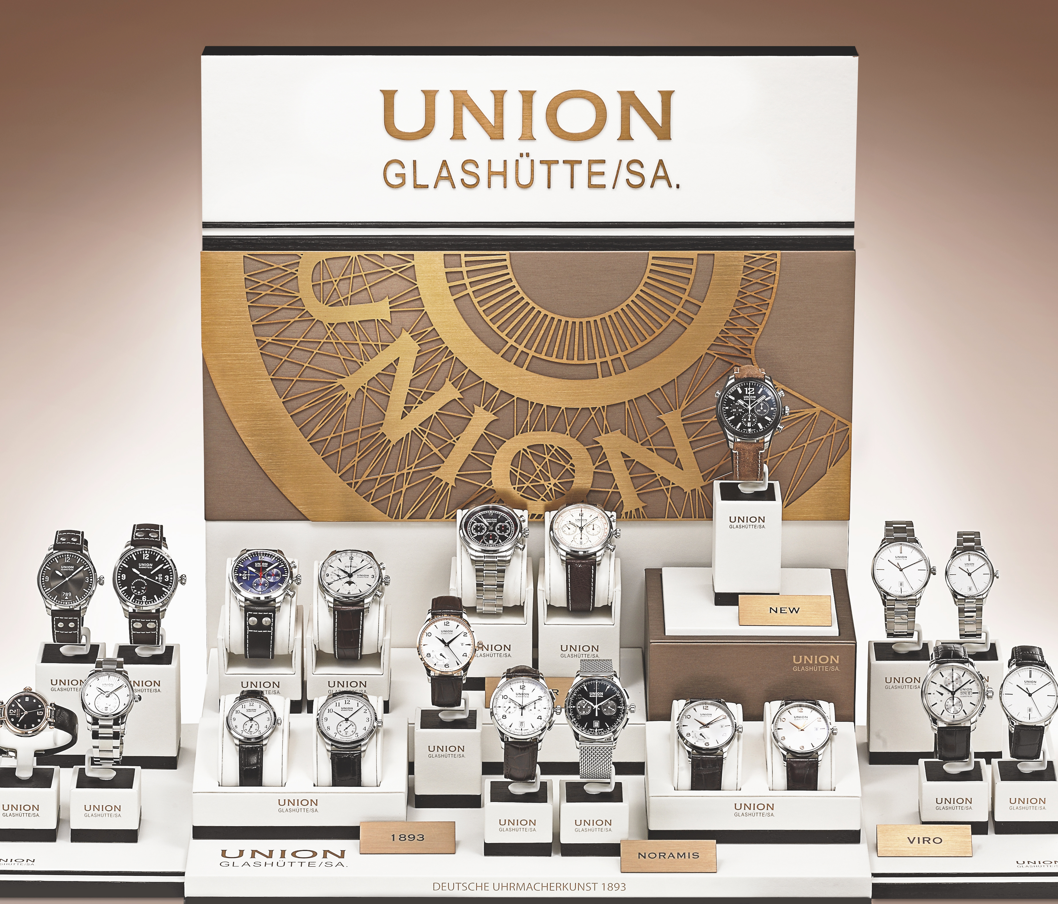 Modelle von Union Glashütte